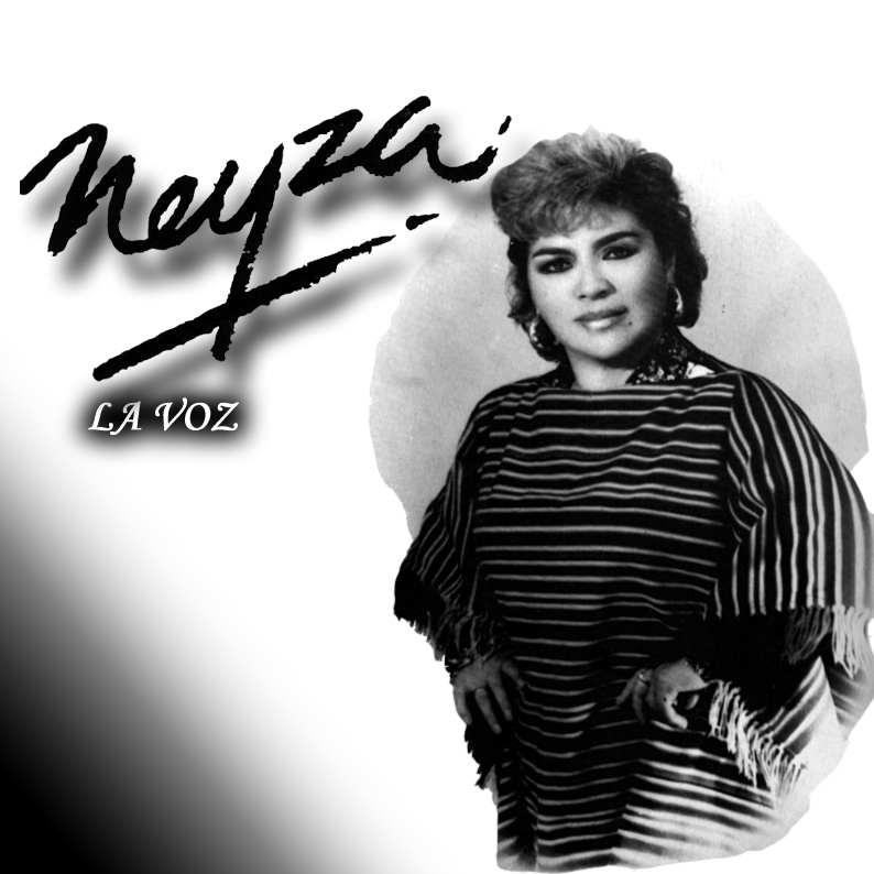 (Spanish) Neyza la Voz, es una gran artista boliviana que expone su arte y talento por todas partes del mundo. Recientemente lanzo al mercado su reciente producción titulado REENCUENTRO.